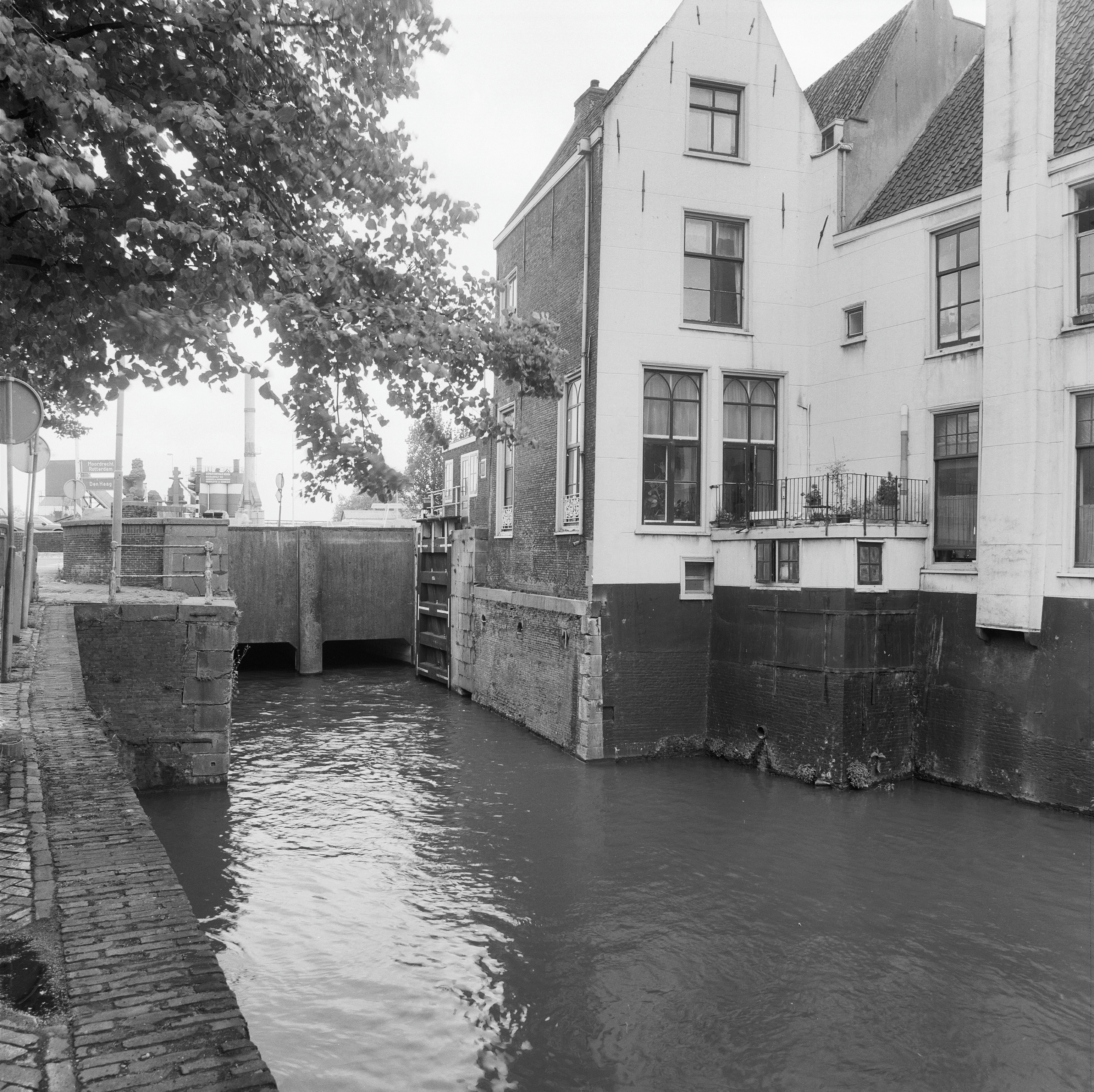 SLUIS MET TOLHUIS: Exterieur BINNENZIJDE SLUIS VANAF OOSTHAVEN. Het Tolhuis is een rijksmonument. De Havensluis is een gemeentelijk monument